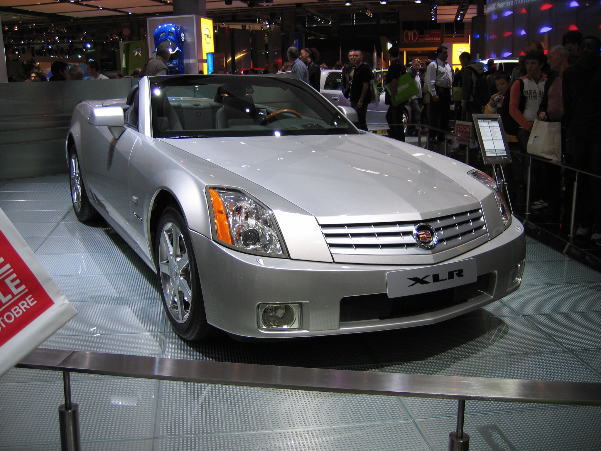 Cadillac XLR op het Parijse autosalon van 2004. Eigen werk, vrij voor het publiek. Categorie:Afbeelding auto